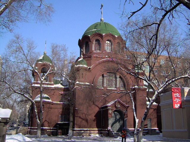 shengmu jiaotang of Harbin